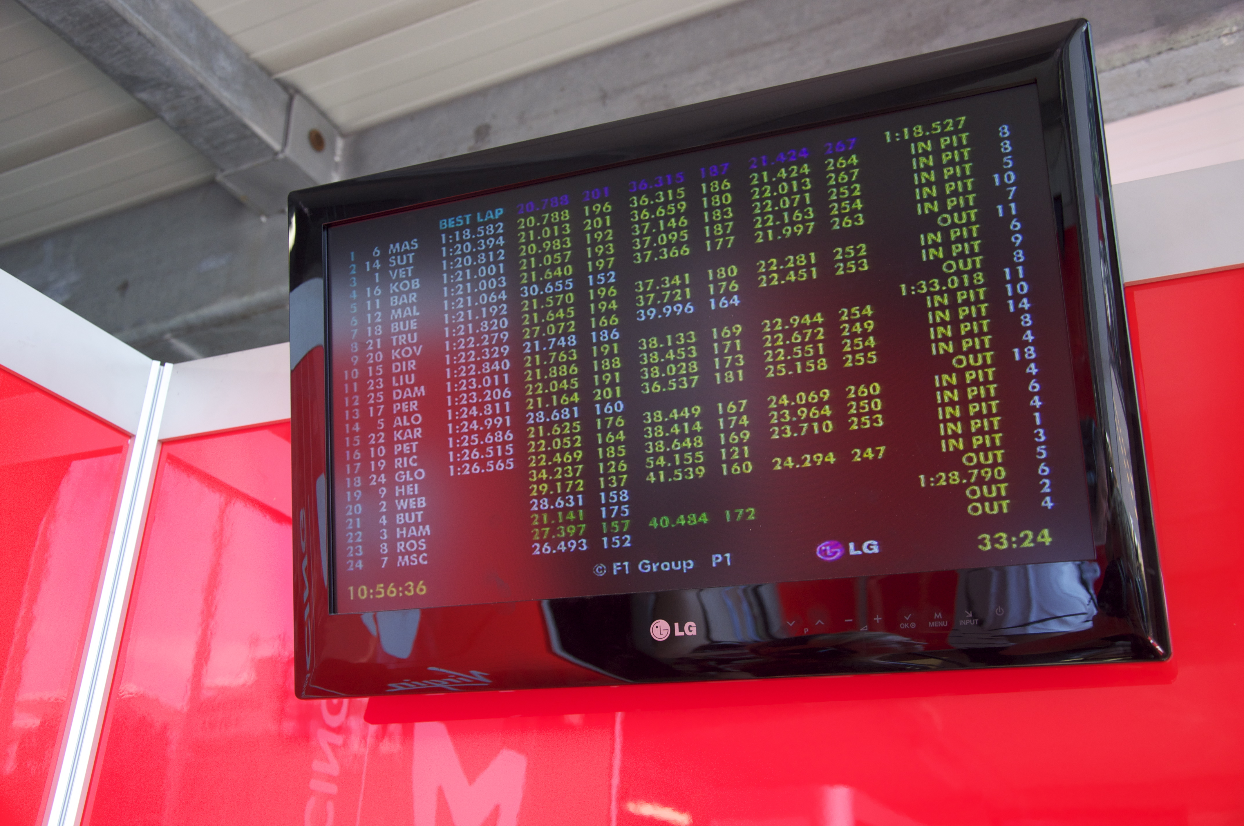 Monaco GP